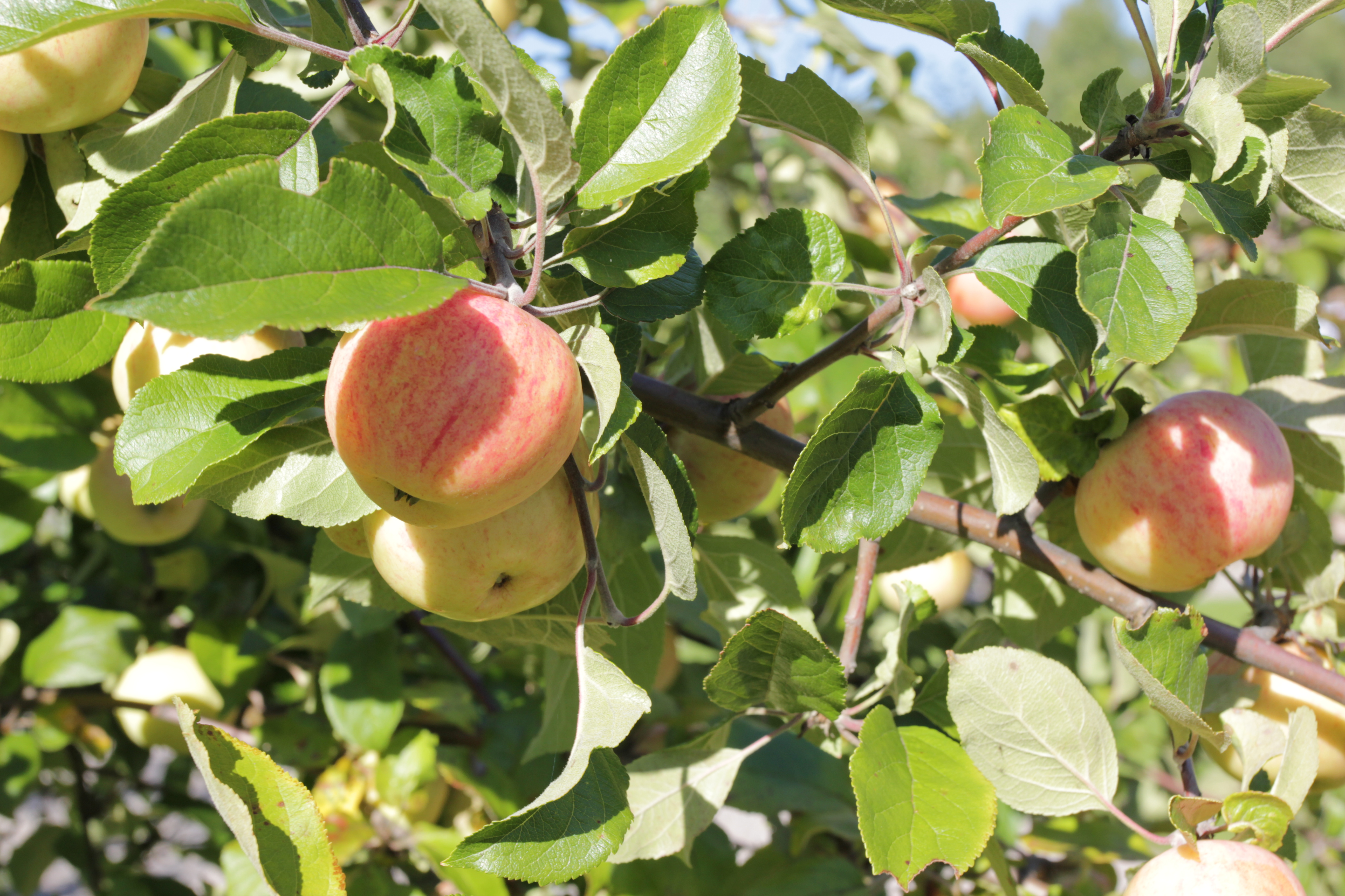 Vit astrakan i Gamla Stabergs äppel- och pärongård i barockträdgården.